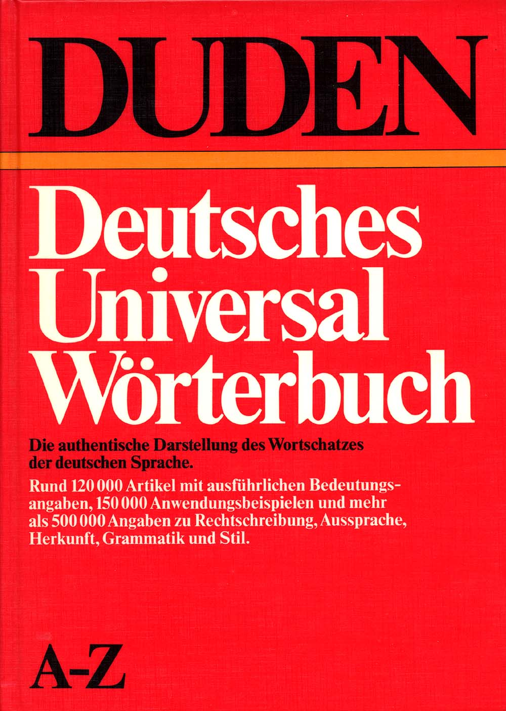 DUDEN Universal Wörterbuch 1983